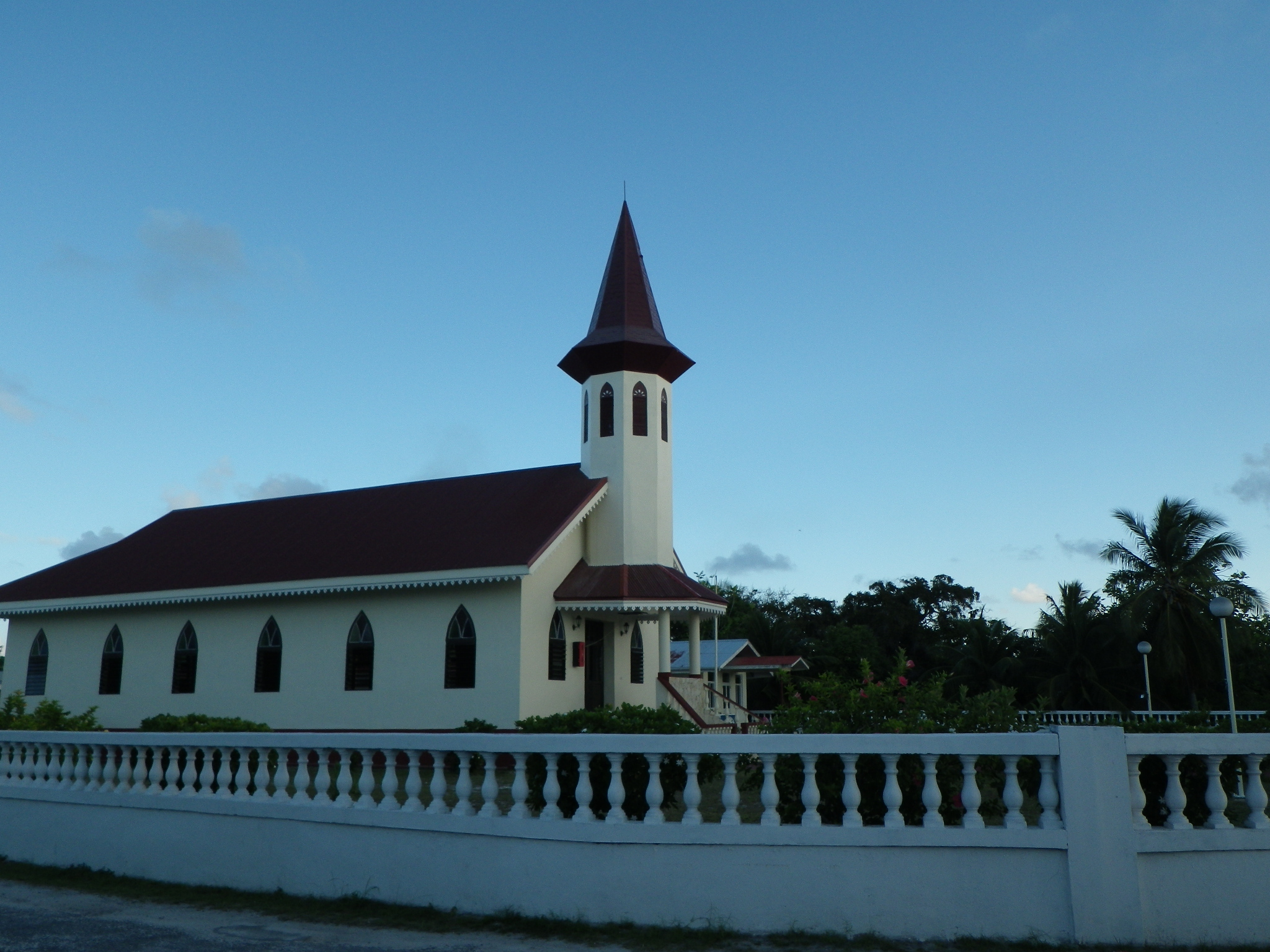 Avatoru